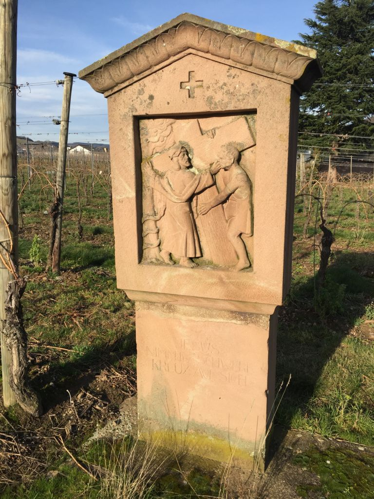 Kreuzweg Trittenheim - Station 2 von 14